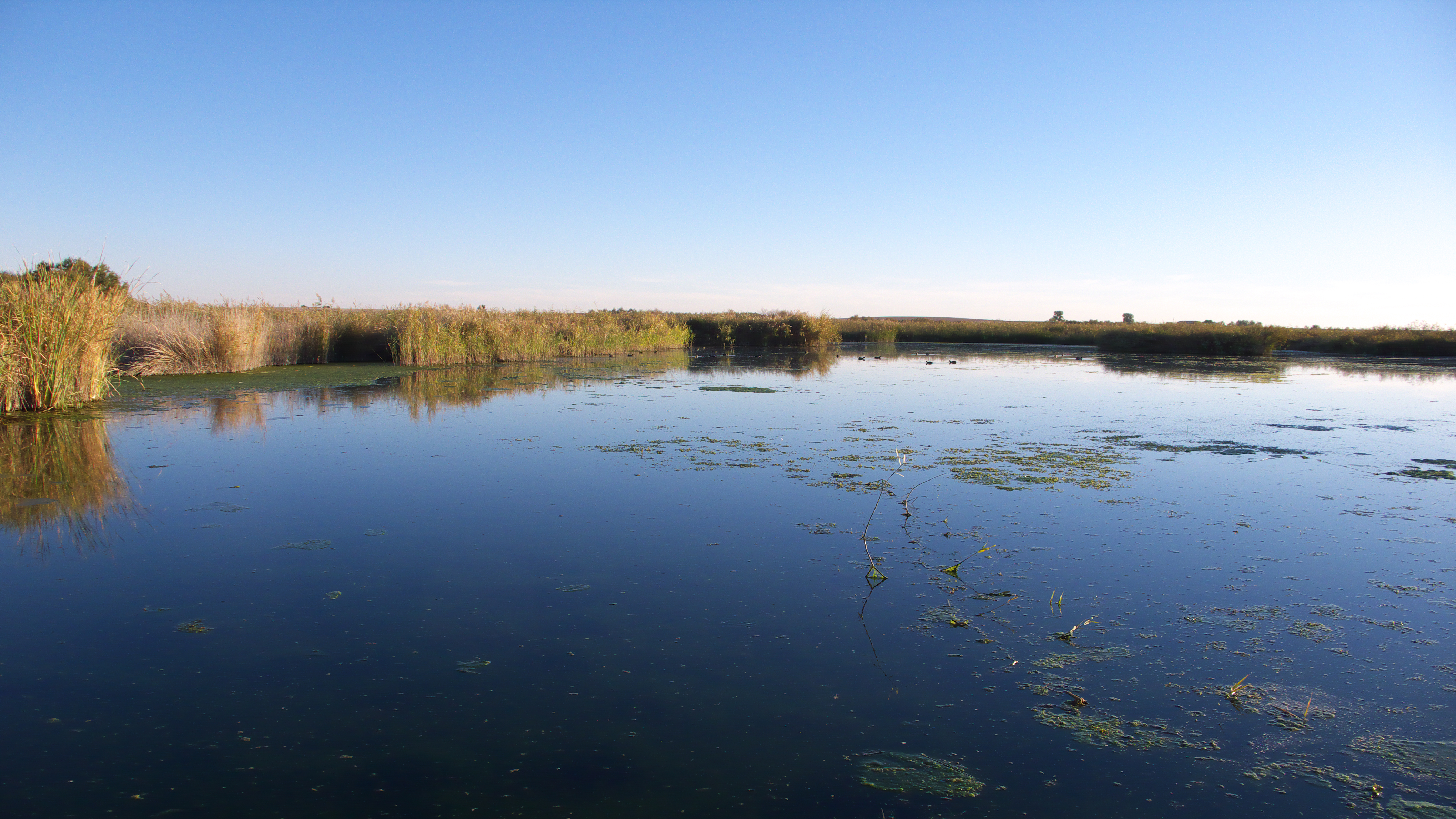 Lagunas producidas por los desbordamientos de los ríos Guadiana y Cigüela.